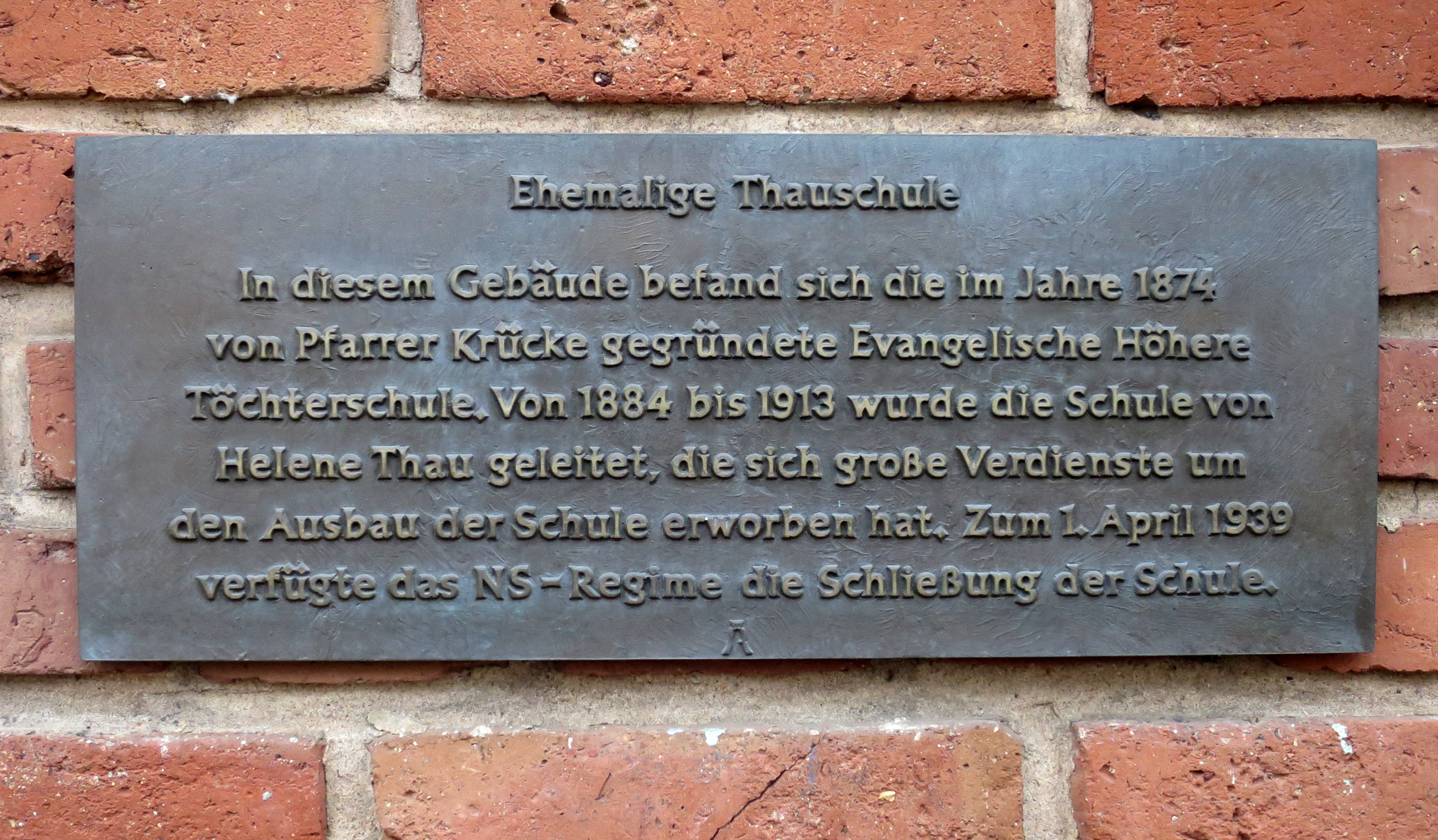 Gedenkschild an der ehemaligen Thauschule, Parkstraße 11-13, in Limburg an der Lahn